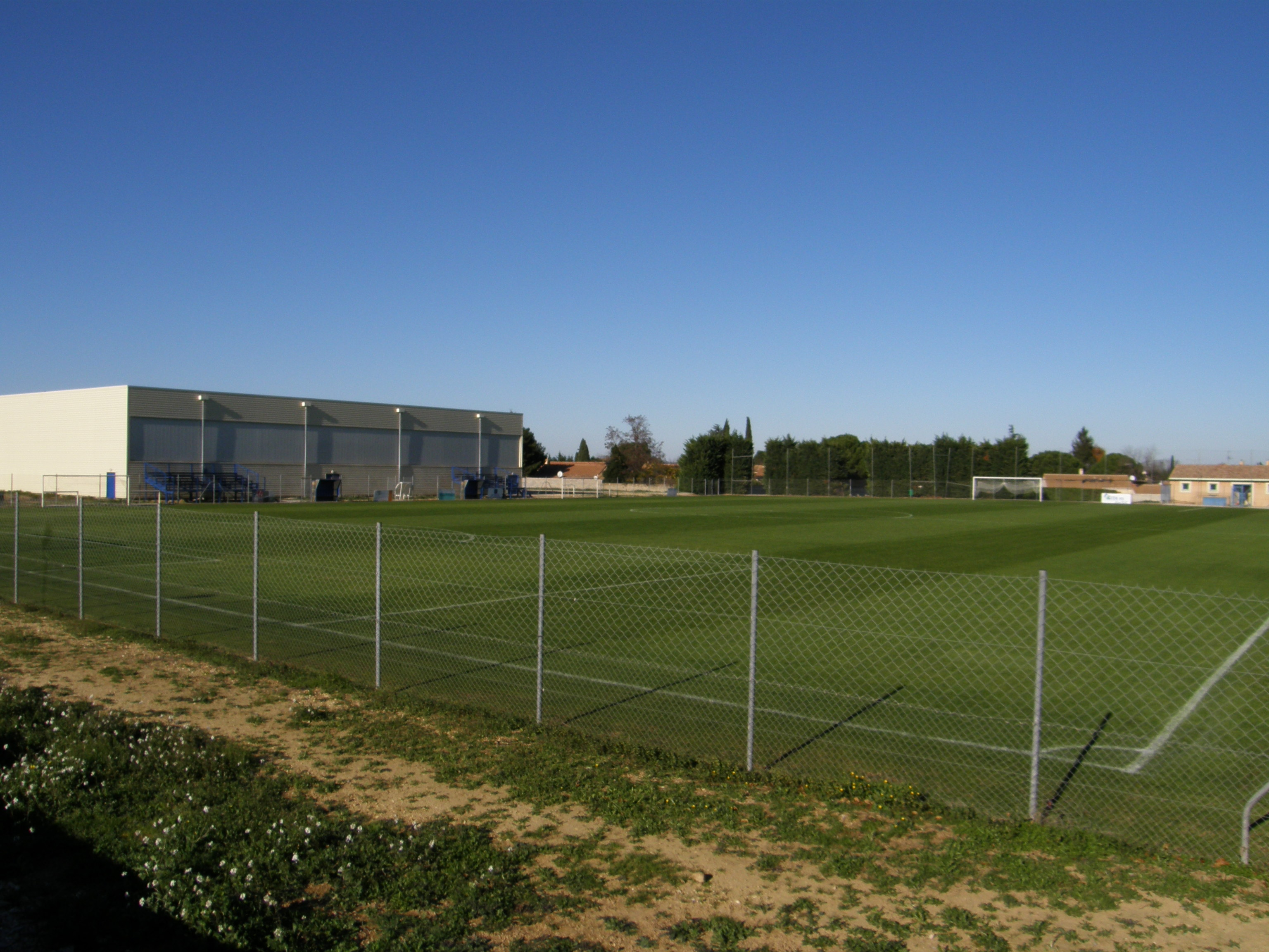 Stade et gymnase de Générac (Gard, France)